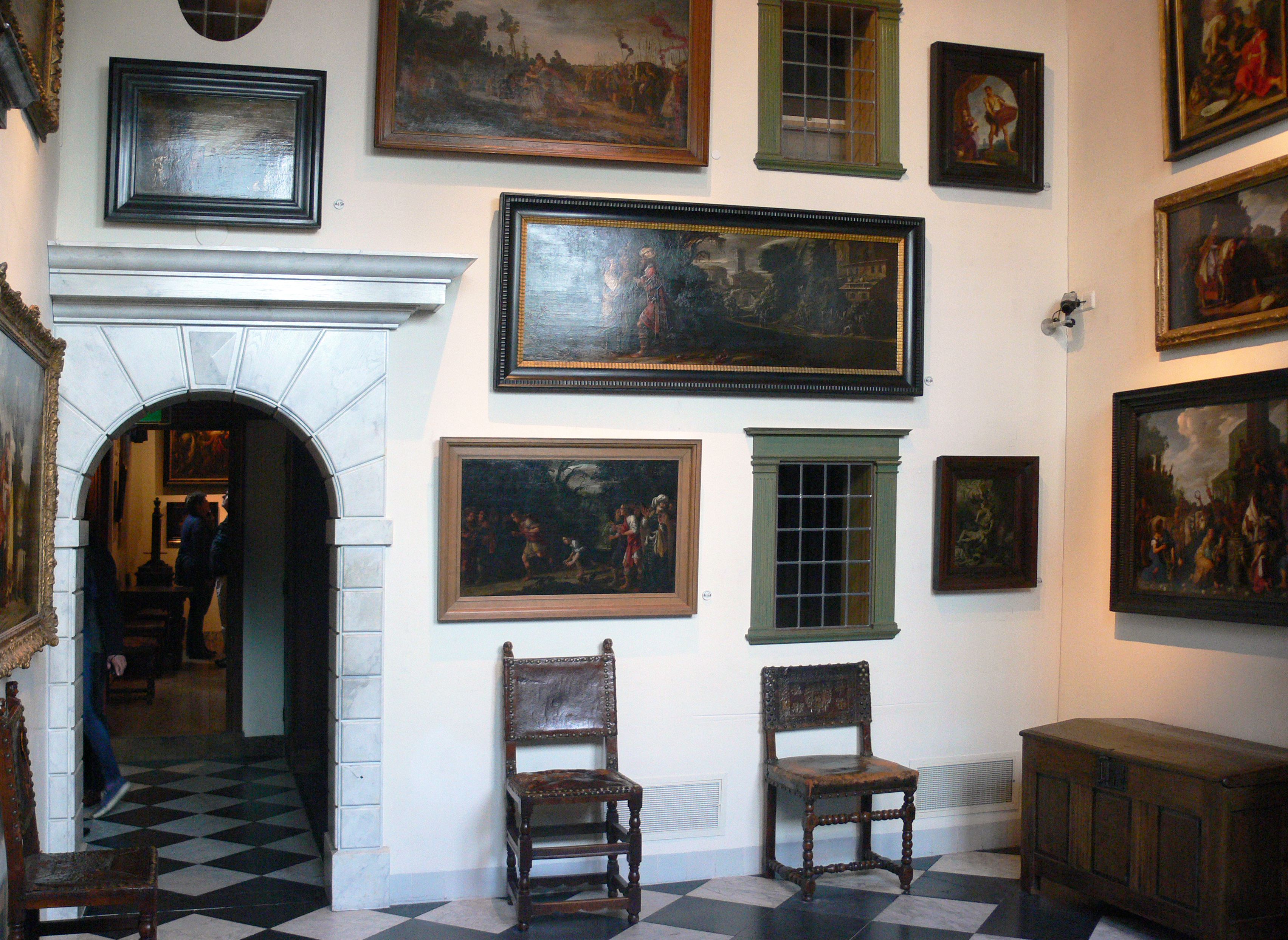 Amsterdam - Rembrandthuis - antechamber